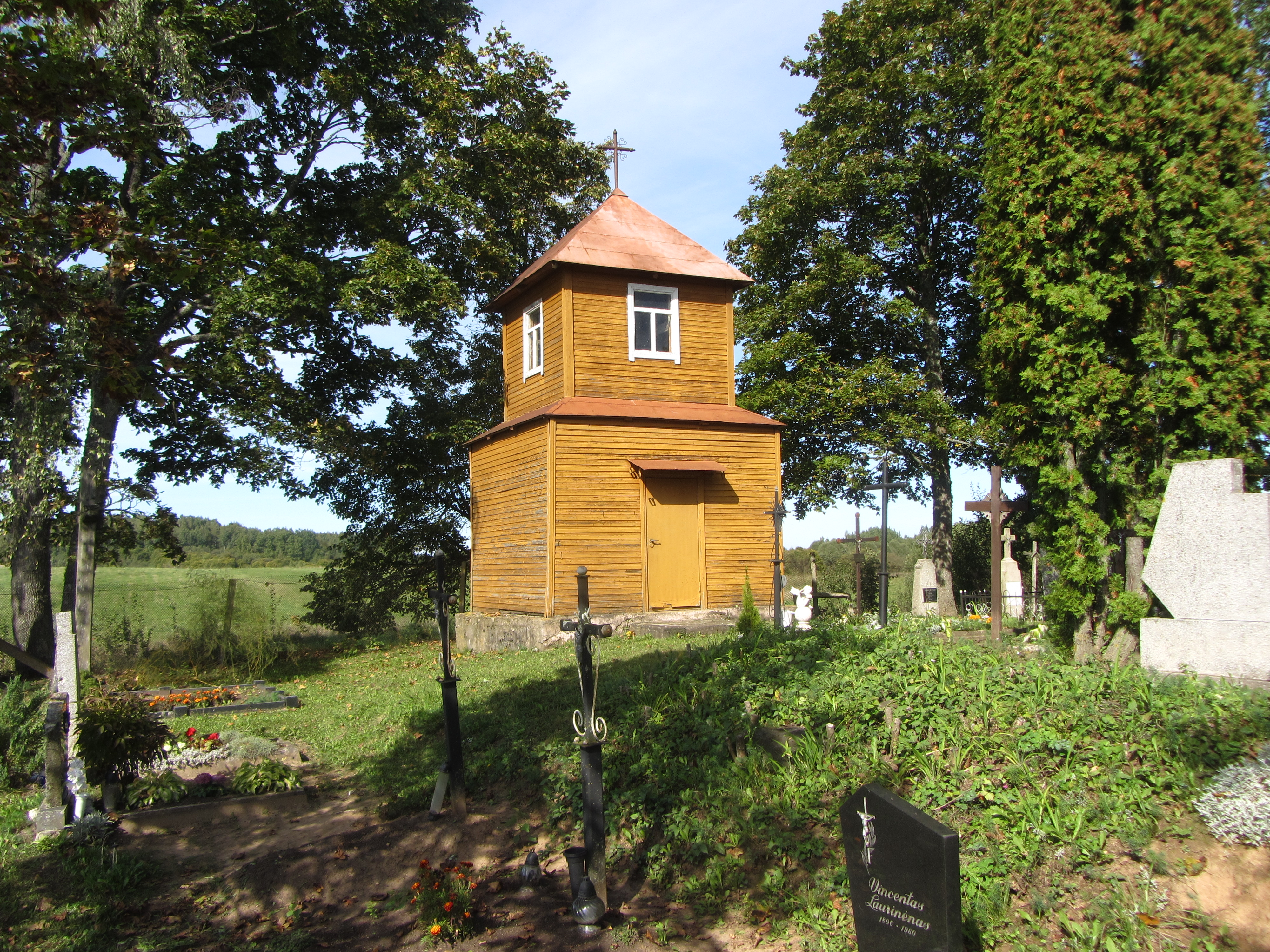 Taujūnai 30288, Lithuania